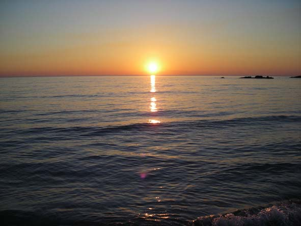 Sunset - Lido Silvana Pulsano (Italy)